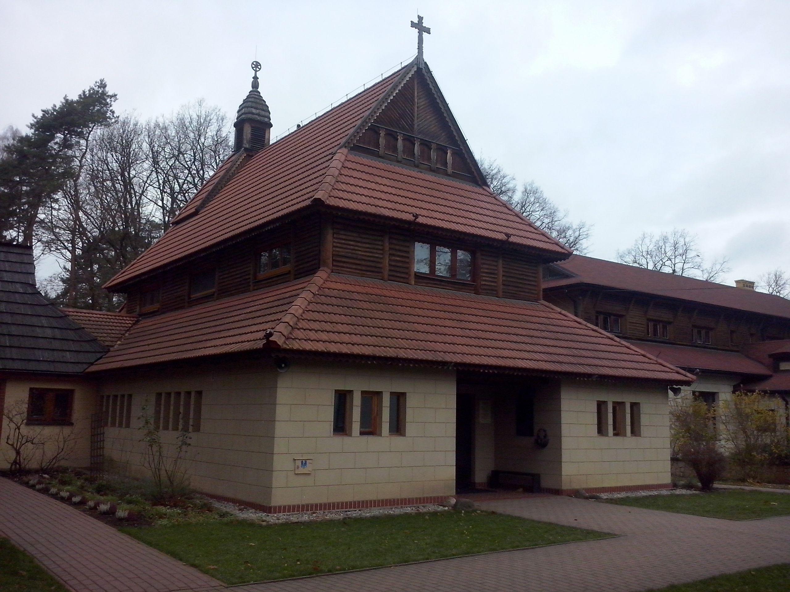 Laski (gm. Izabelin, pow. zachodni warszawski) - kaplica Matki Bożej Anielskiej